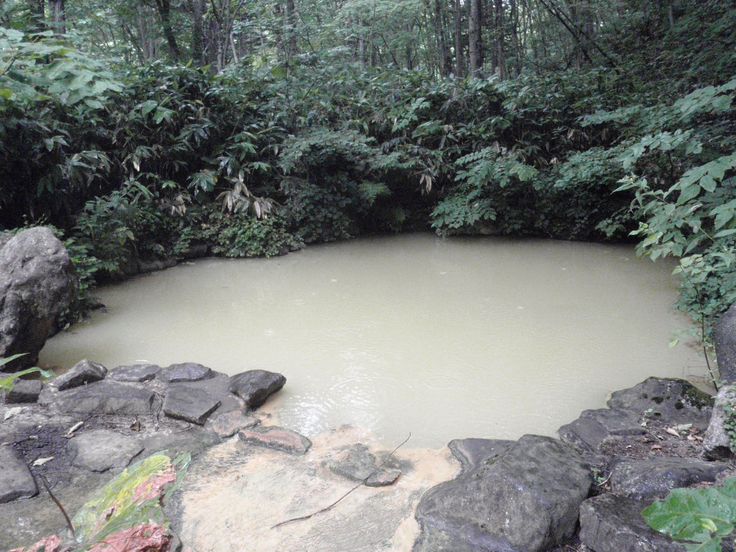 ニセコ薬師温泉露天風呂